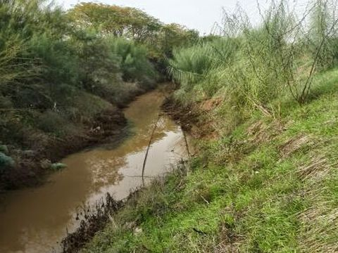 נחל שפירים . צילום אלי אלון